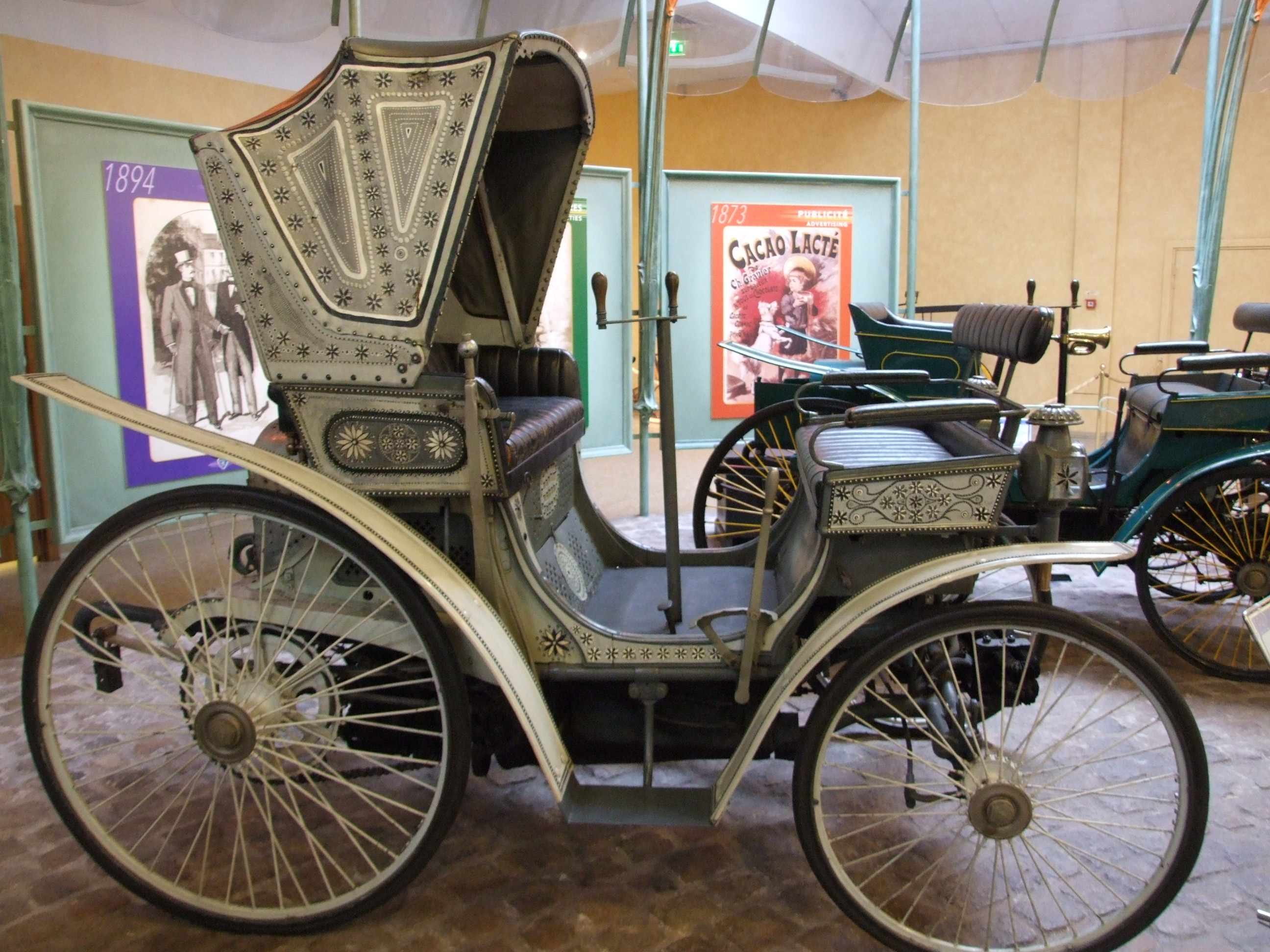 Musée de l'Aventure Peugeot-Sochaux, Sochaux, Doubs, Franche-Comté, FRANCE